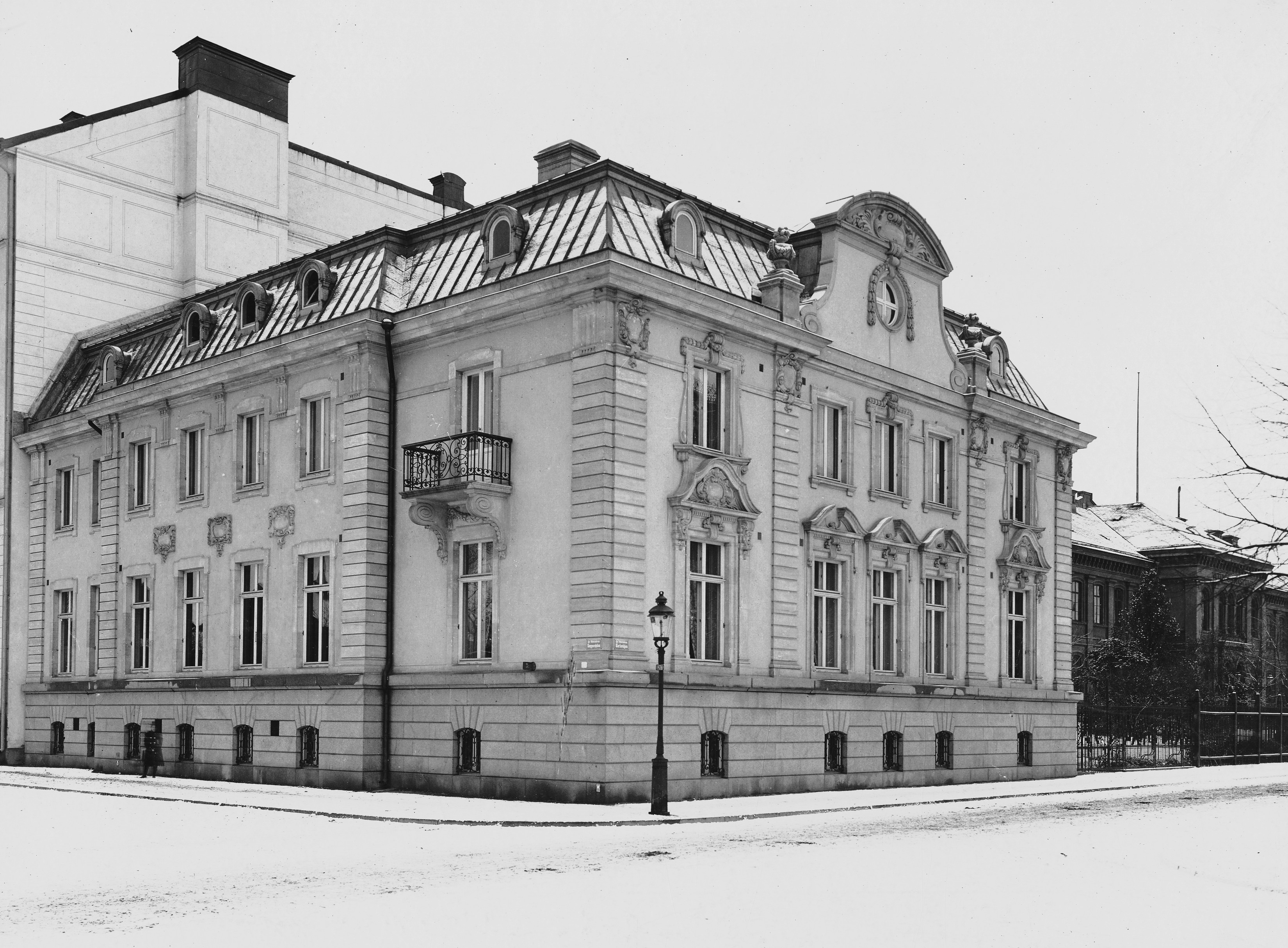 Falkmanska villan i hörnet av Karlavägen 81 och Skeppargatan 64. Byggnadsår 1901-1902. Byggherre: Edward Liljewalch Arkitekter: Erik Lallerstedt och Ture Stenberg. Till höger Veterinärinstitutet